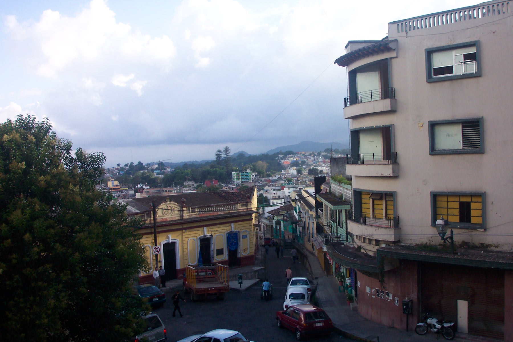 Foto propia. Salvador Barrera Rodriguez, Junio 2004